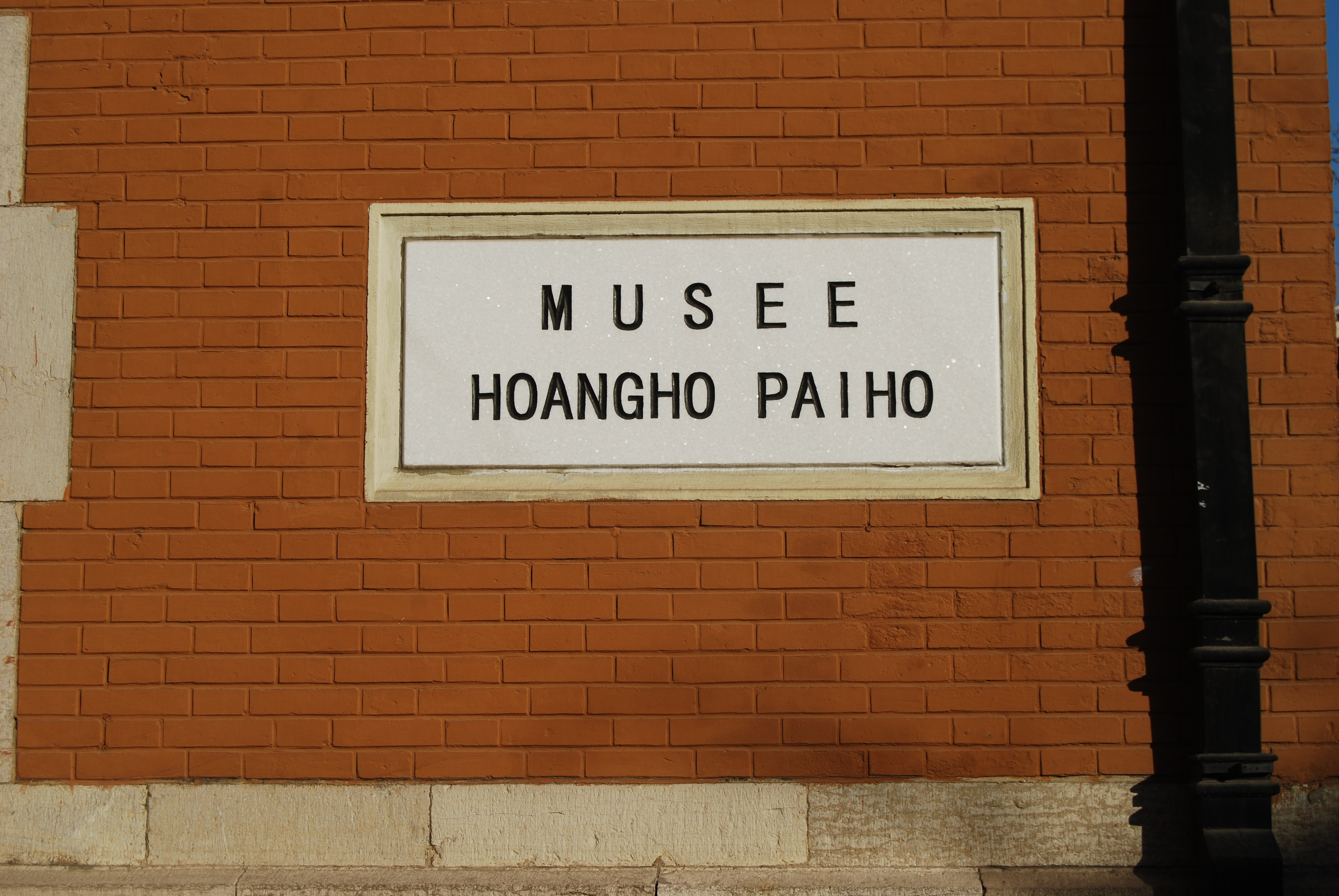 天津市历史风貌建筑